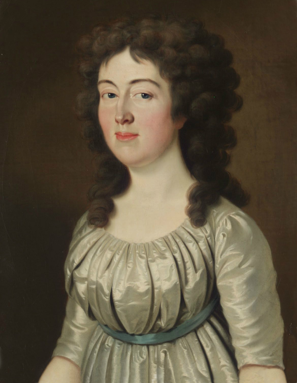 Marie Friederike von Hessen-Kassel (1768-1839), Fürstin von Anhalt-Benburg